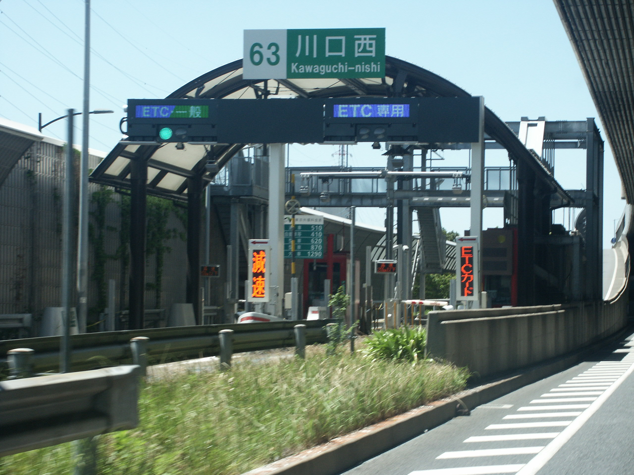 東京外環自動車道川口西インター料金所